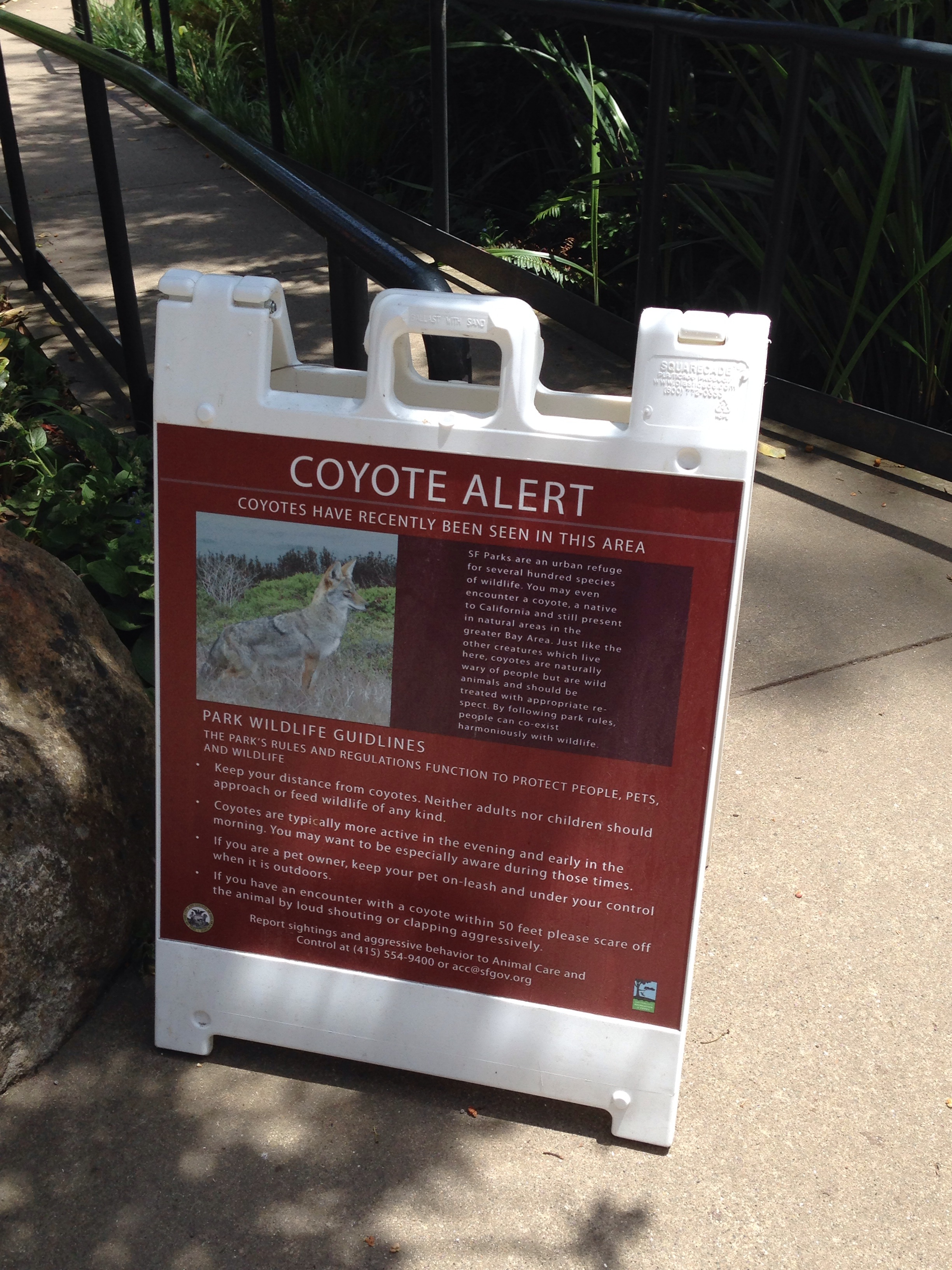 Coyote alert sign